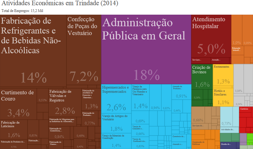 Atividades Econômicas do município brasileiro de Trindade, estado de Goiás, em 2014.